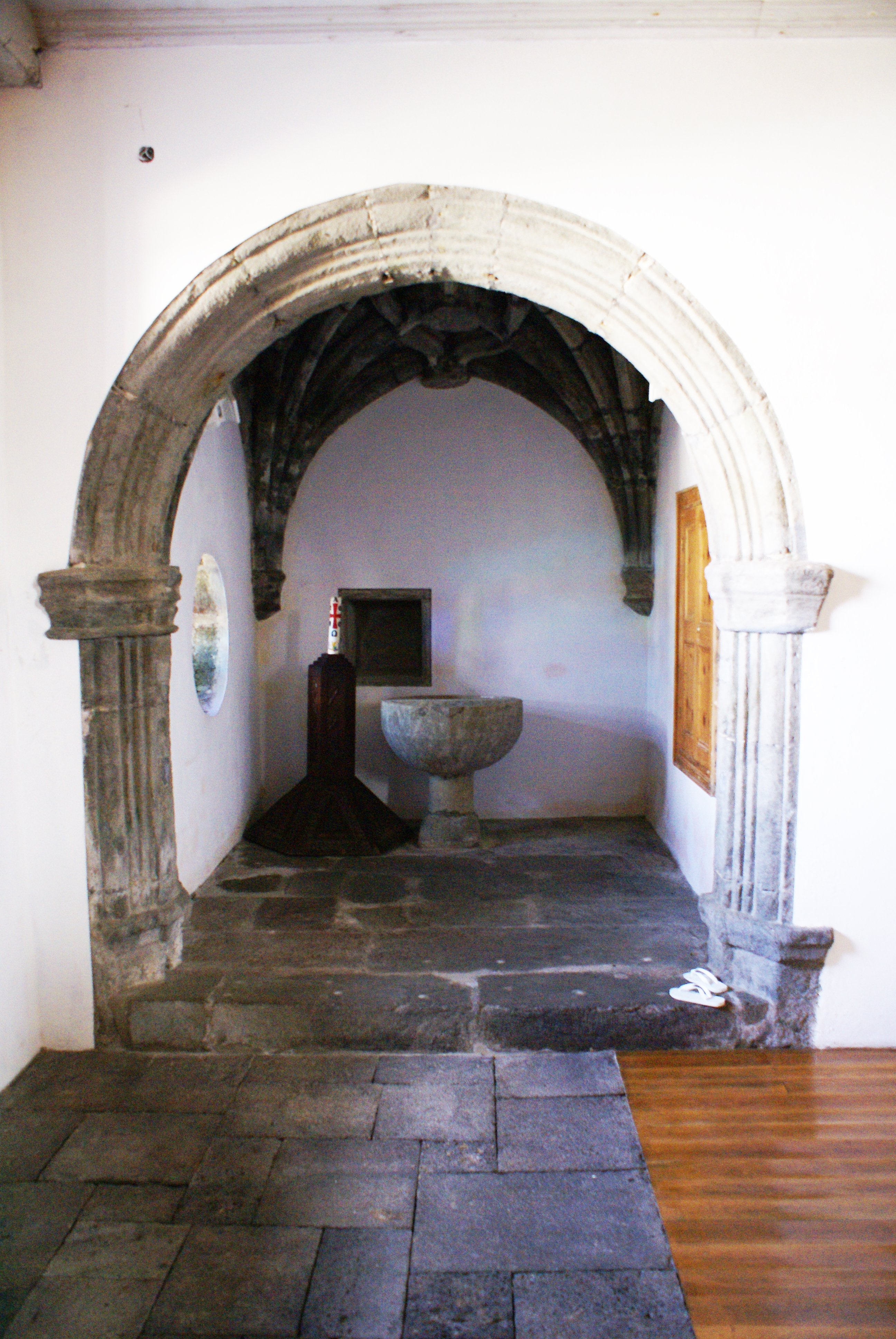 Igreja Matriz de Santa Cruz da Graciosa, pia batismal, Santa Cruz da Graciosa, ilha Graciosa, Açores, Portugal